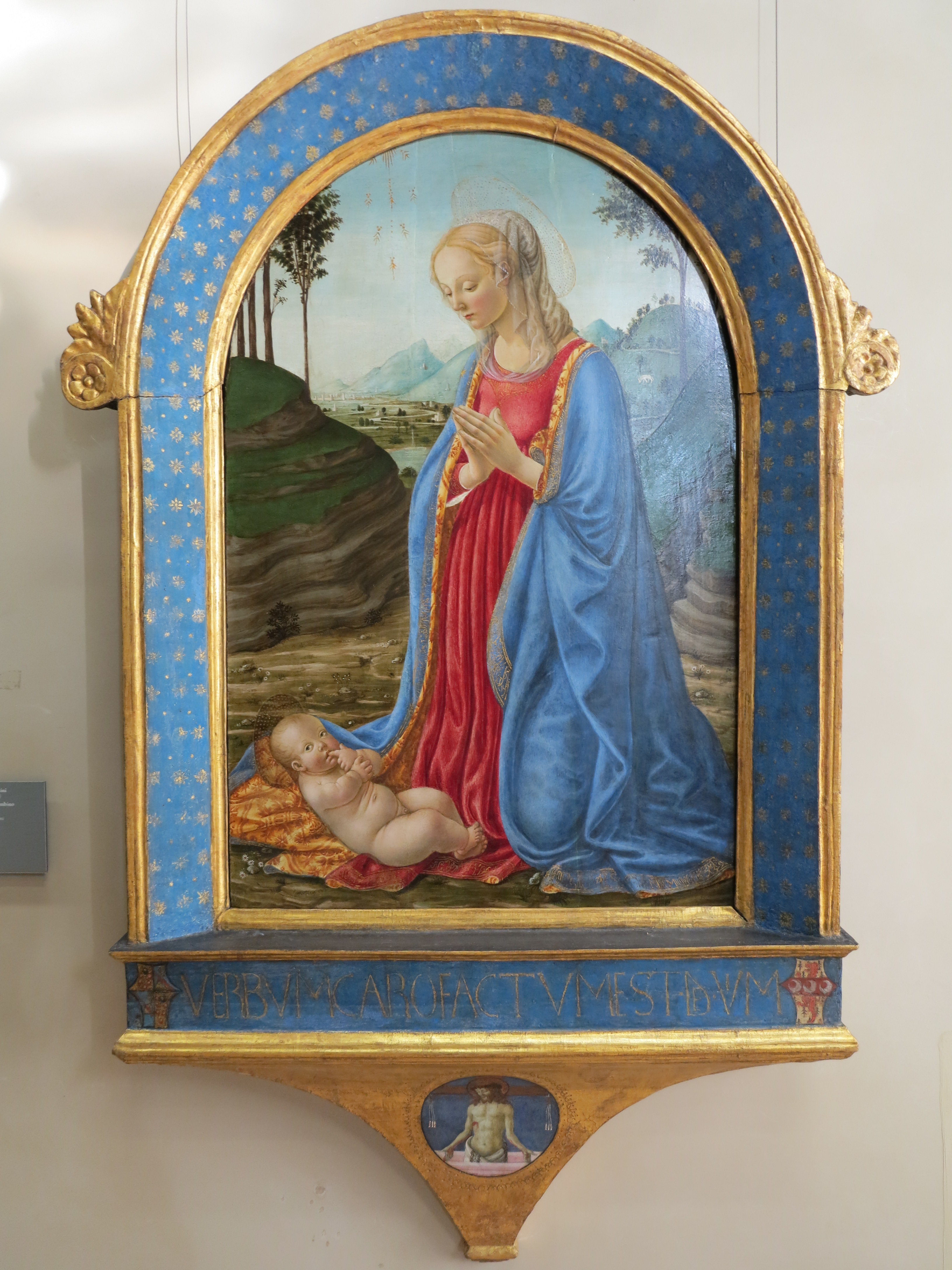 Galleria G. Franchetti alla Ca' d'Oro - MIBAC This is a photo of a monument which is part of cultural heritage of Italy.